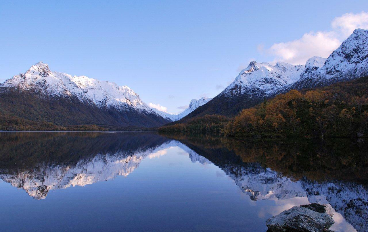 Bilde av nedre Blokkenvatn, Nervatnet. Fotograf er Frank Olsen. Bildet er tatt september 2009